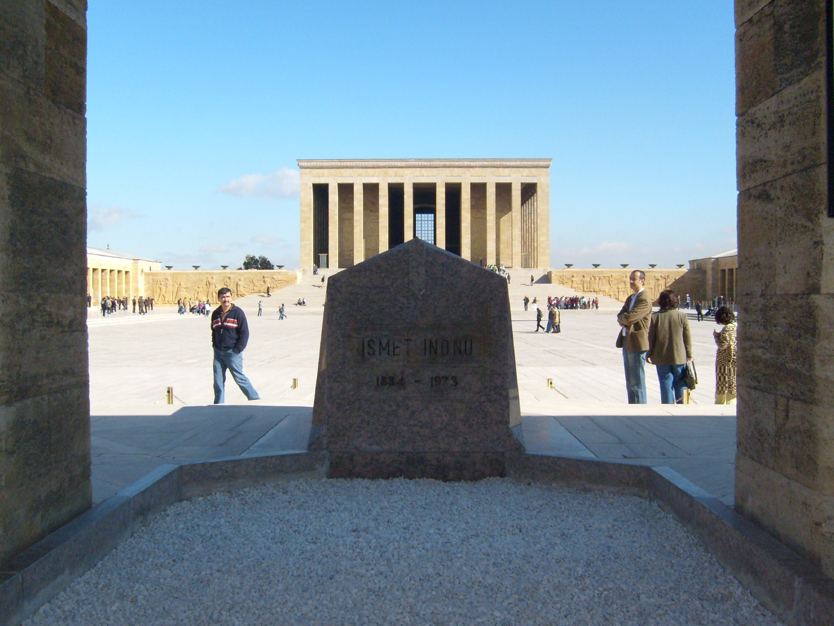 İsmet İnönü'nün kabrinden Anıtkabir'e bakış